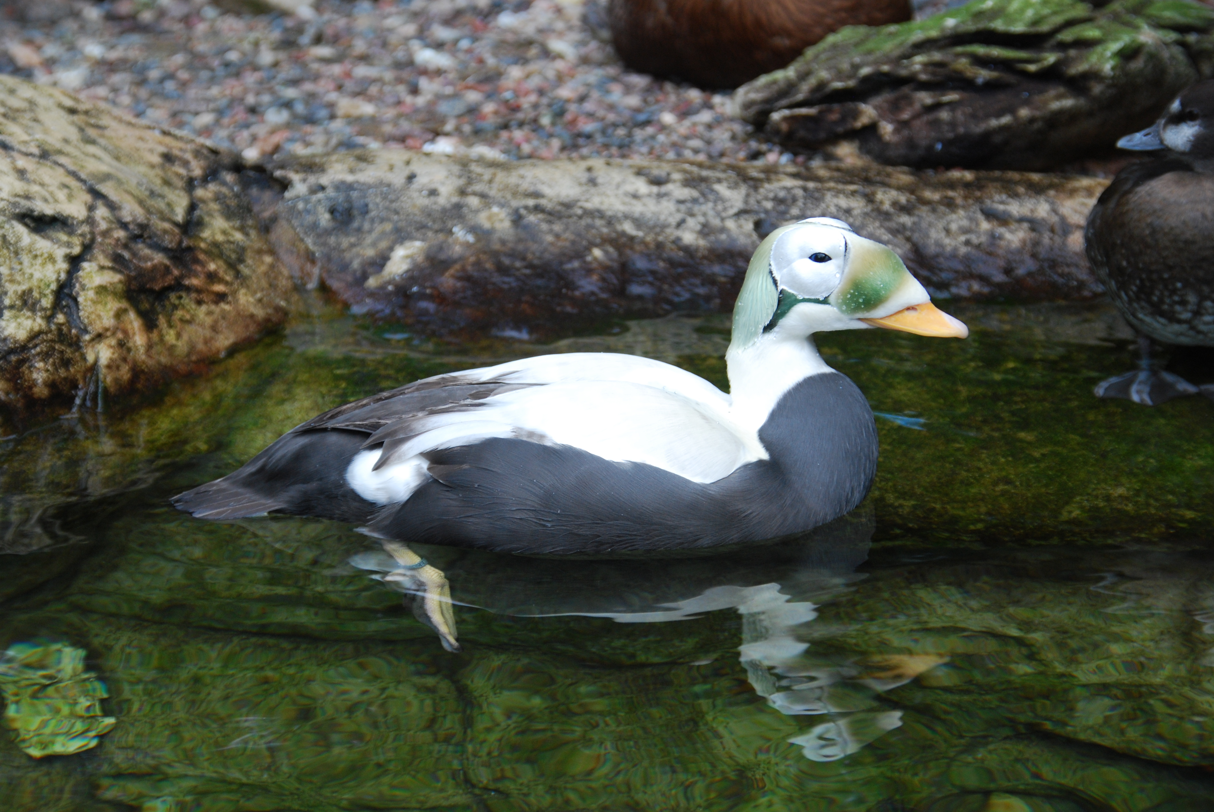 San Diego Zoo